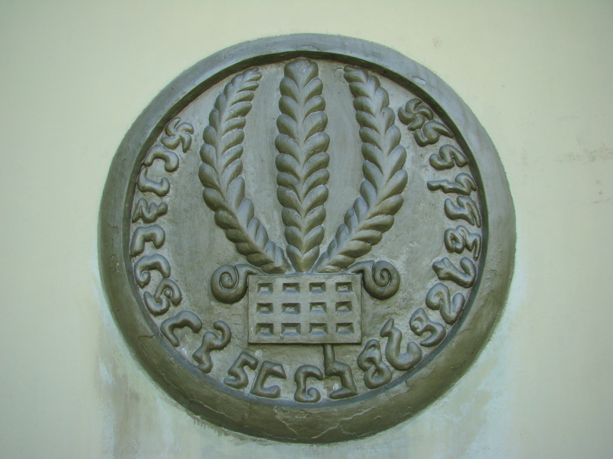 Mahasthangar Museum Bogra Bangladesh